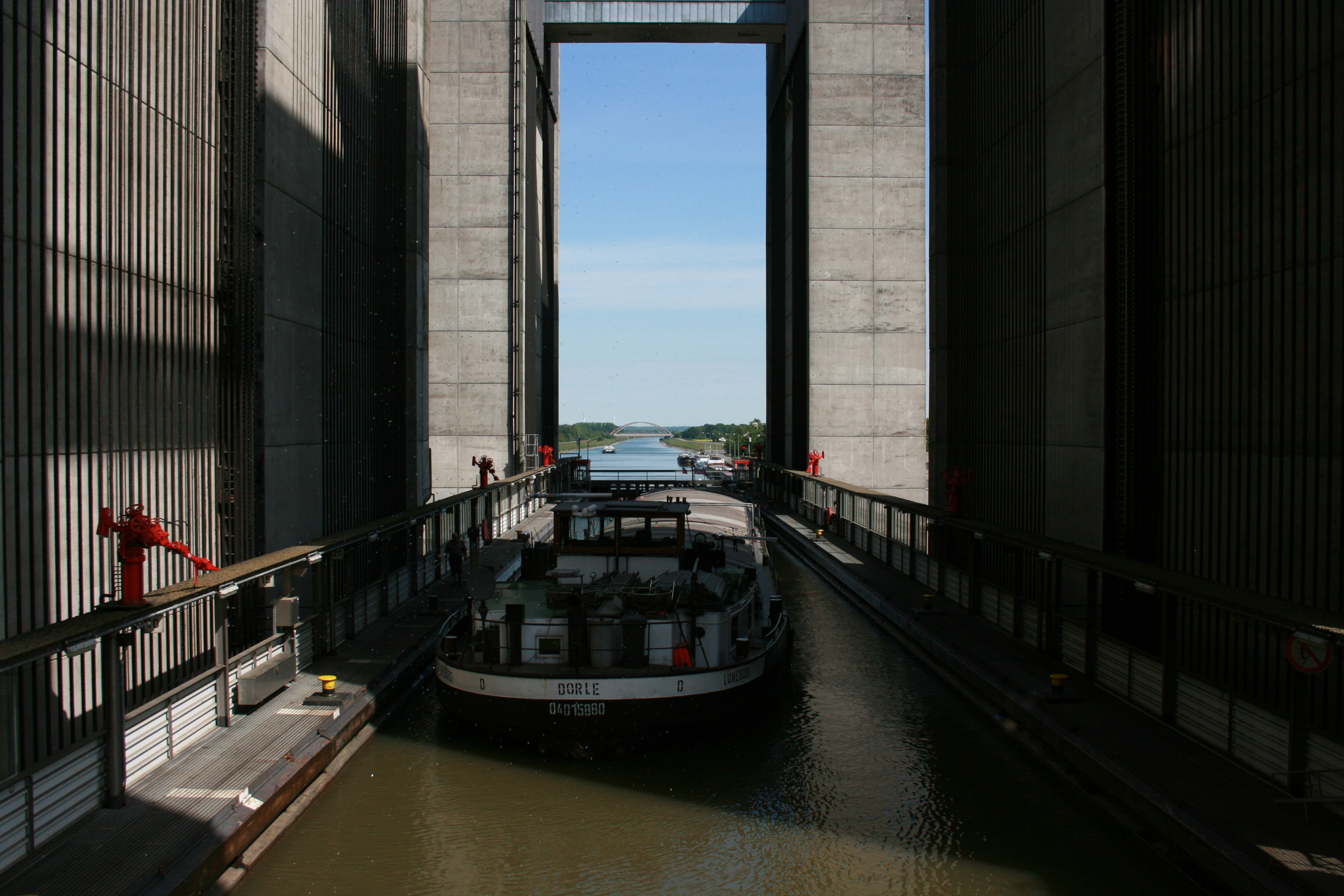 Schiffshebewerk Scharnebeck: GMS Dorle - Lüneburg, ENI:04015880